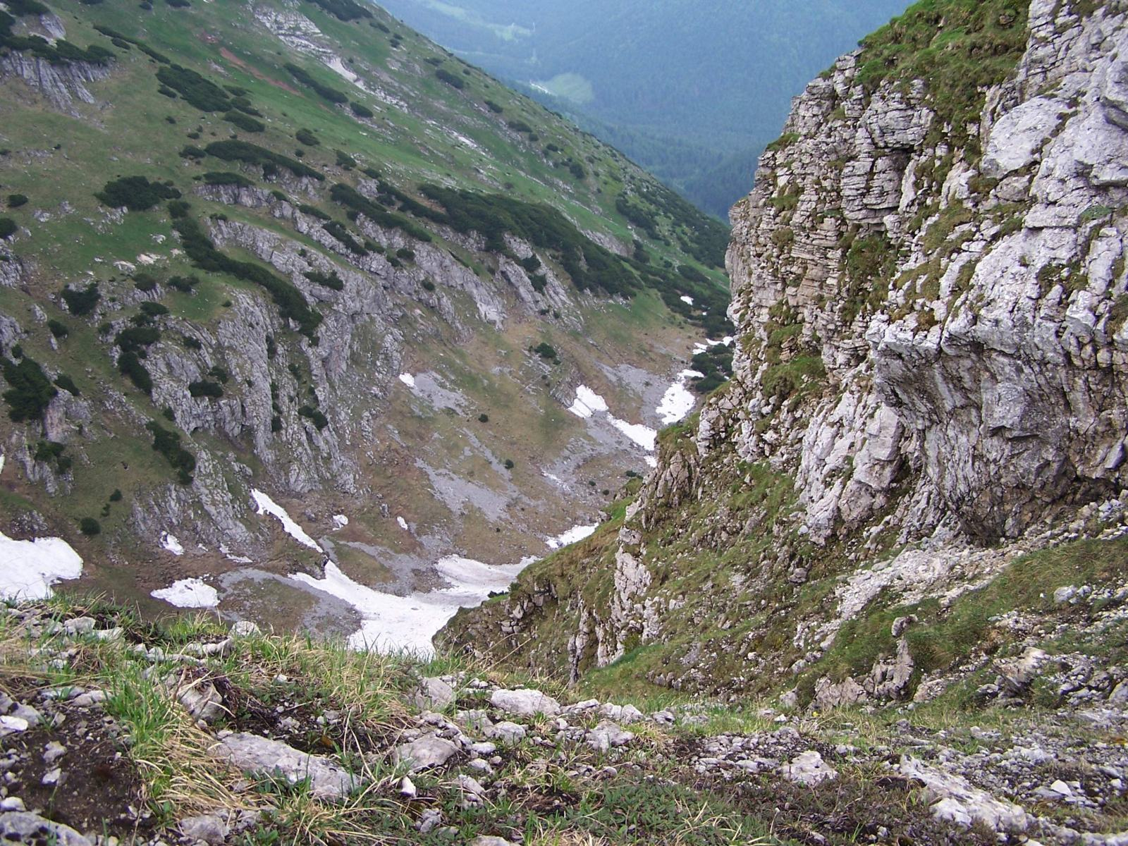 Kamienisty Żleb (Dolina Tomanowa)